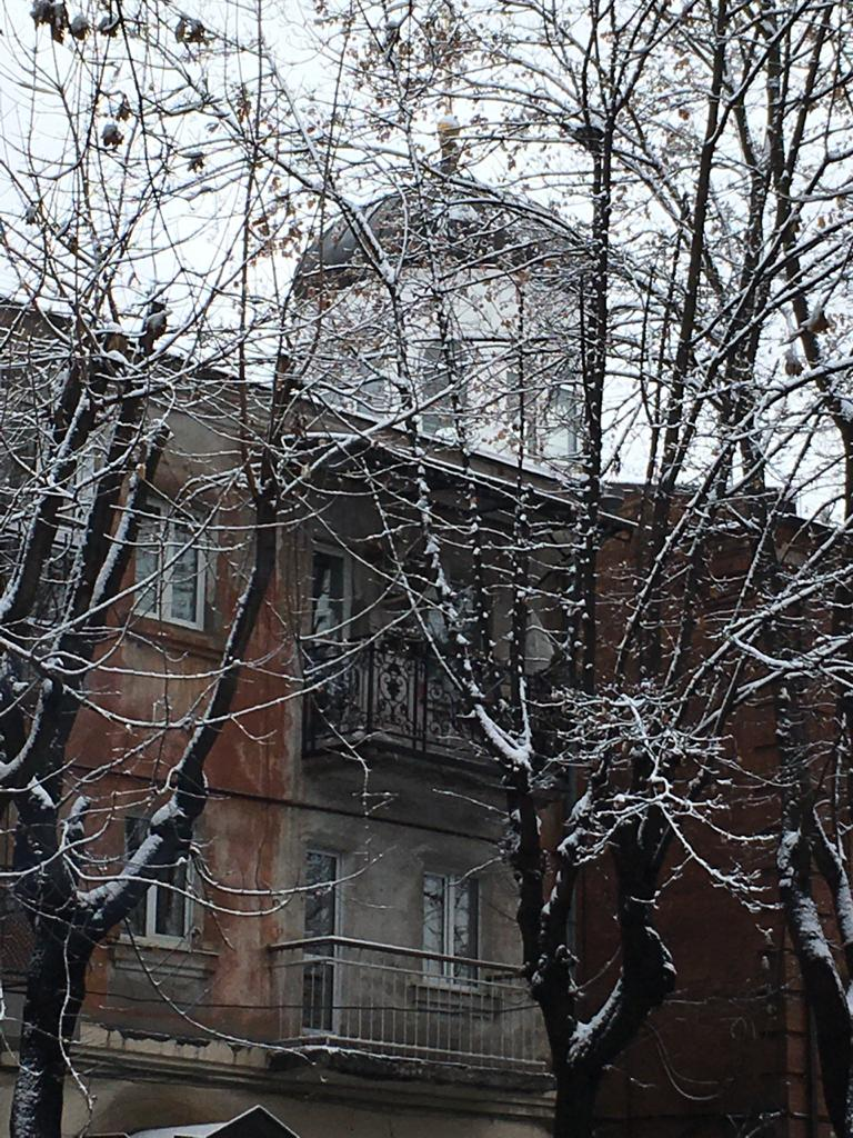 Ольгинская женская гимназия: улица Маркуса, 24, Владикавказ, Северная Осетия